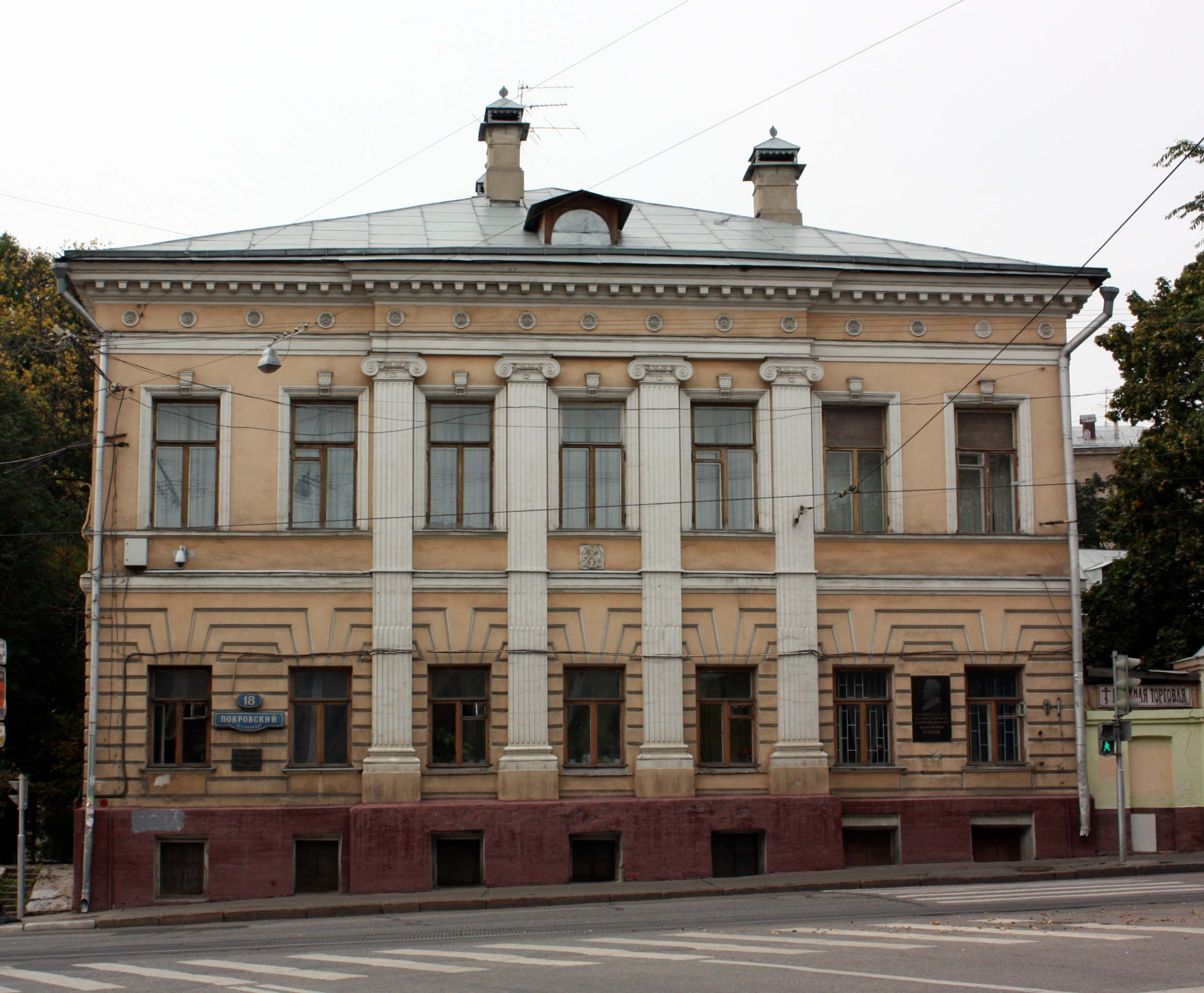 Дом Карзинкиных-Телешовых на Покровском переулке в Москве.